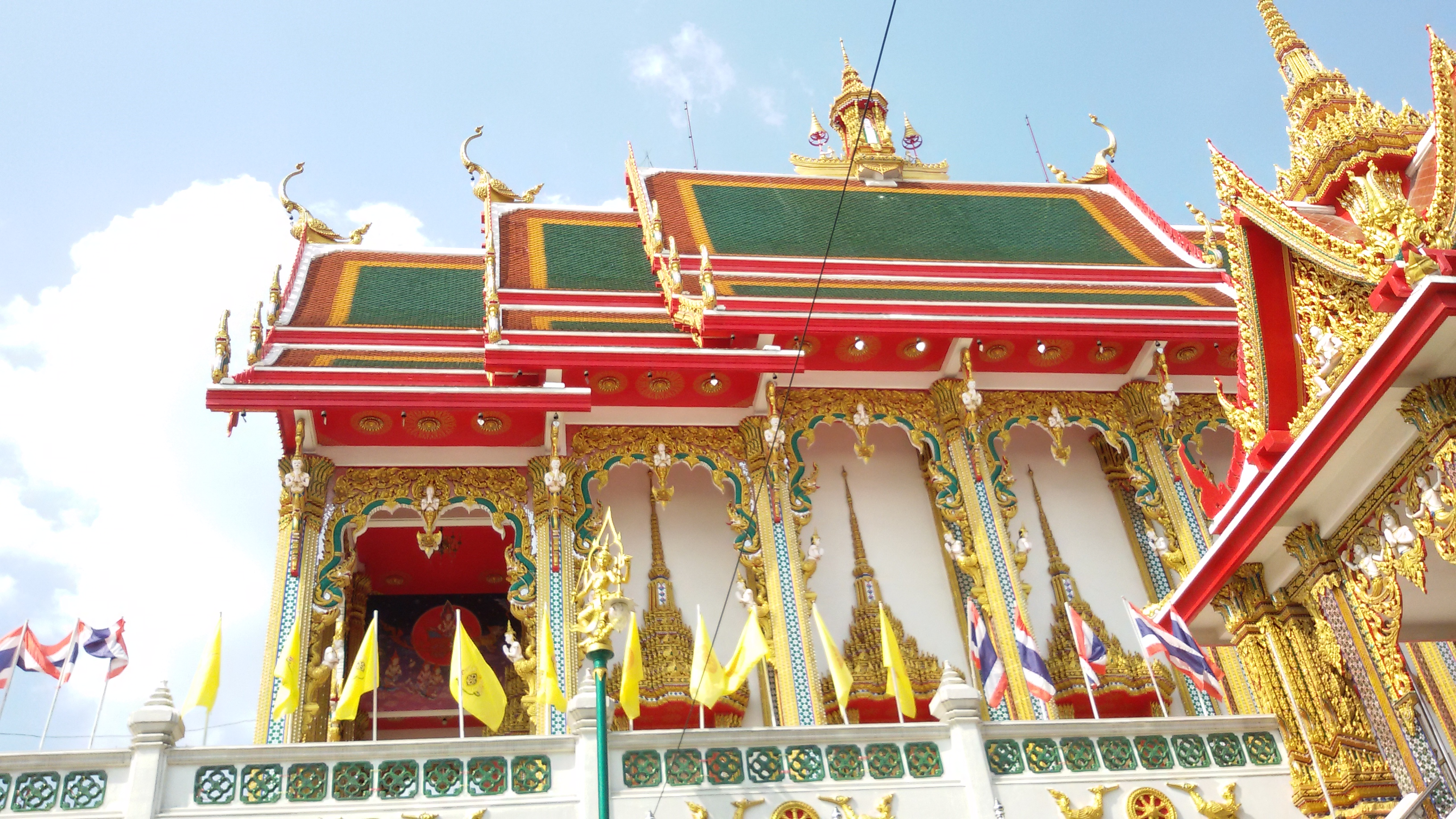 วัดบ่อ